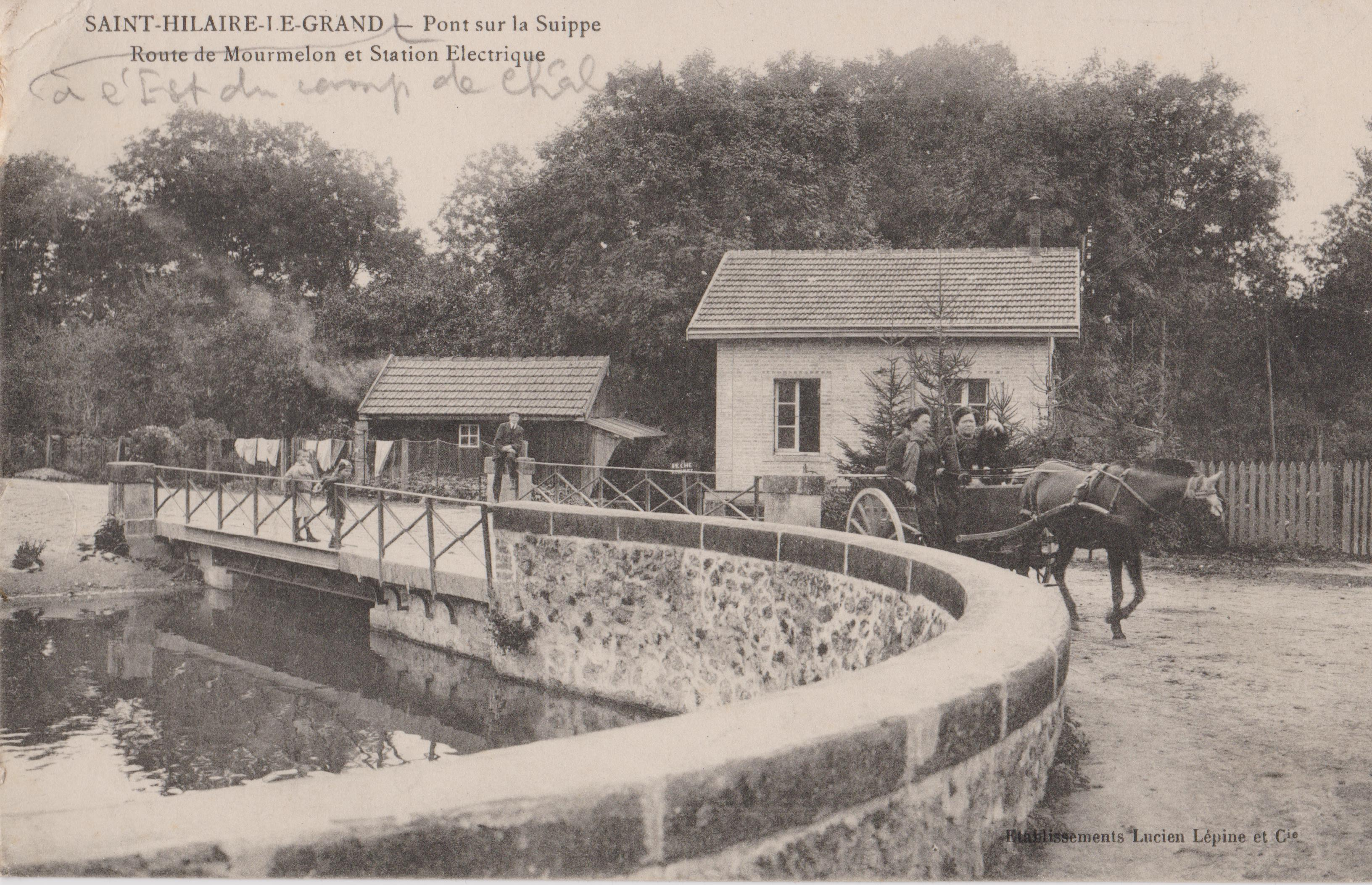 Le pont sur la Suippe à Saint-Hilaire-le-Grand, avec la route de Marmelon et Station Electrique